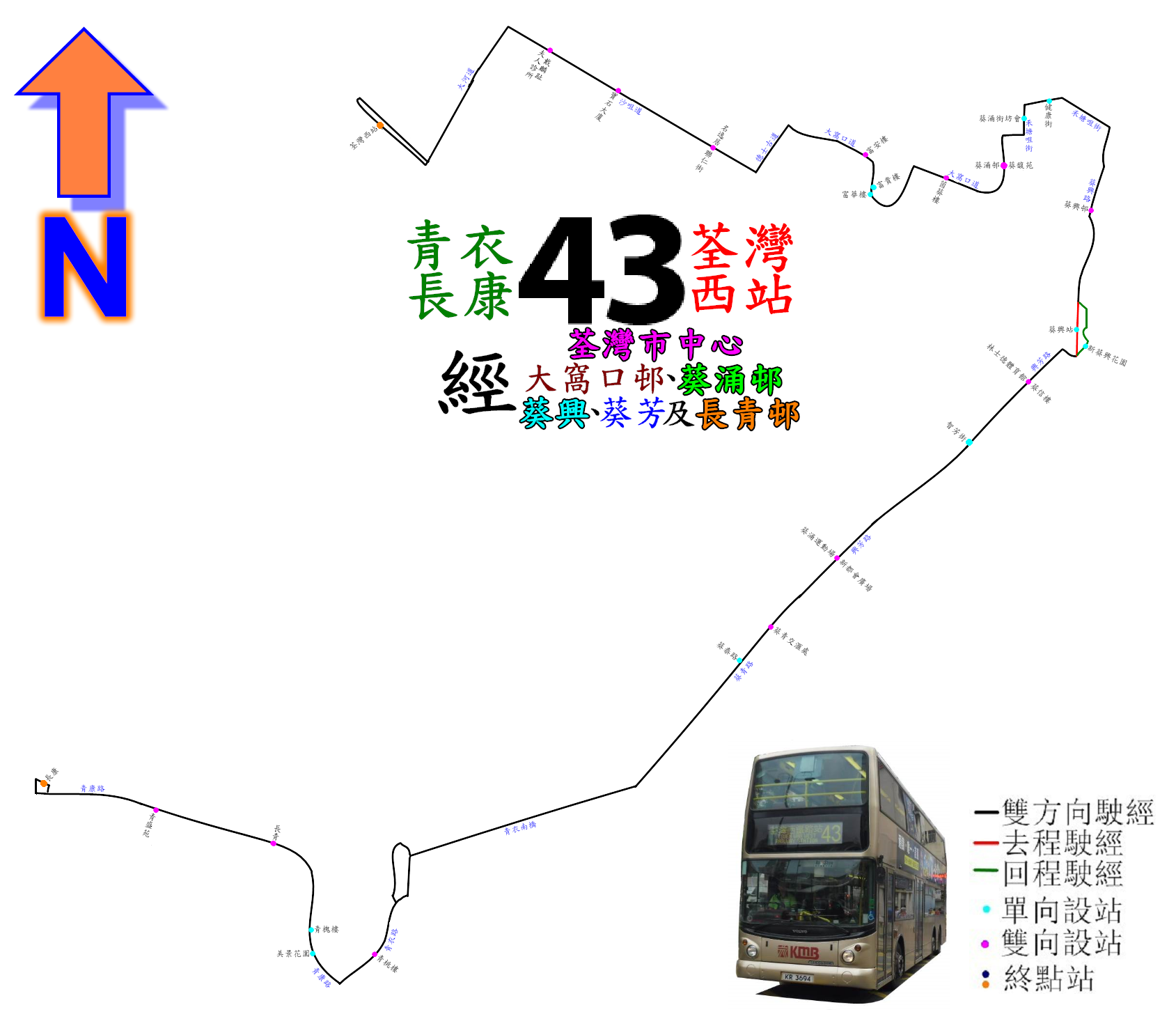 中文（香港）: 九巴43路的走線圖